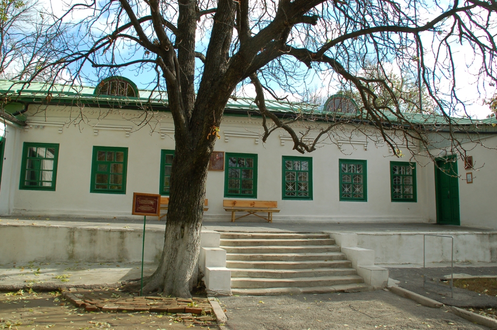 Музей-садиба В.І. Немировича-Данченко розташований у селі Нескучне